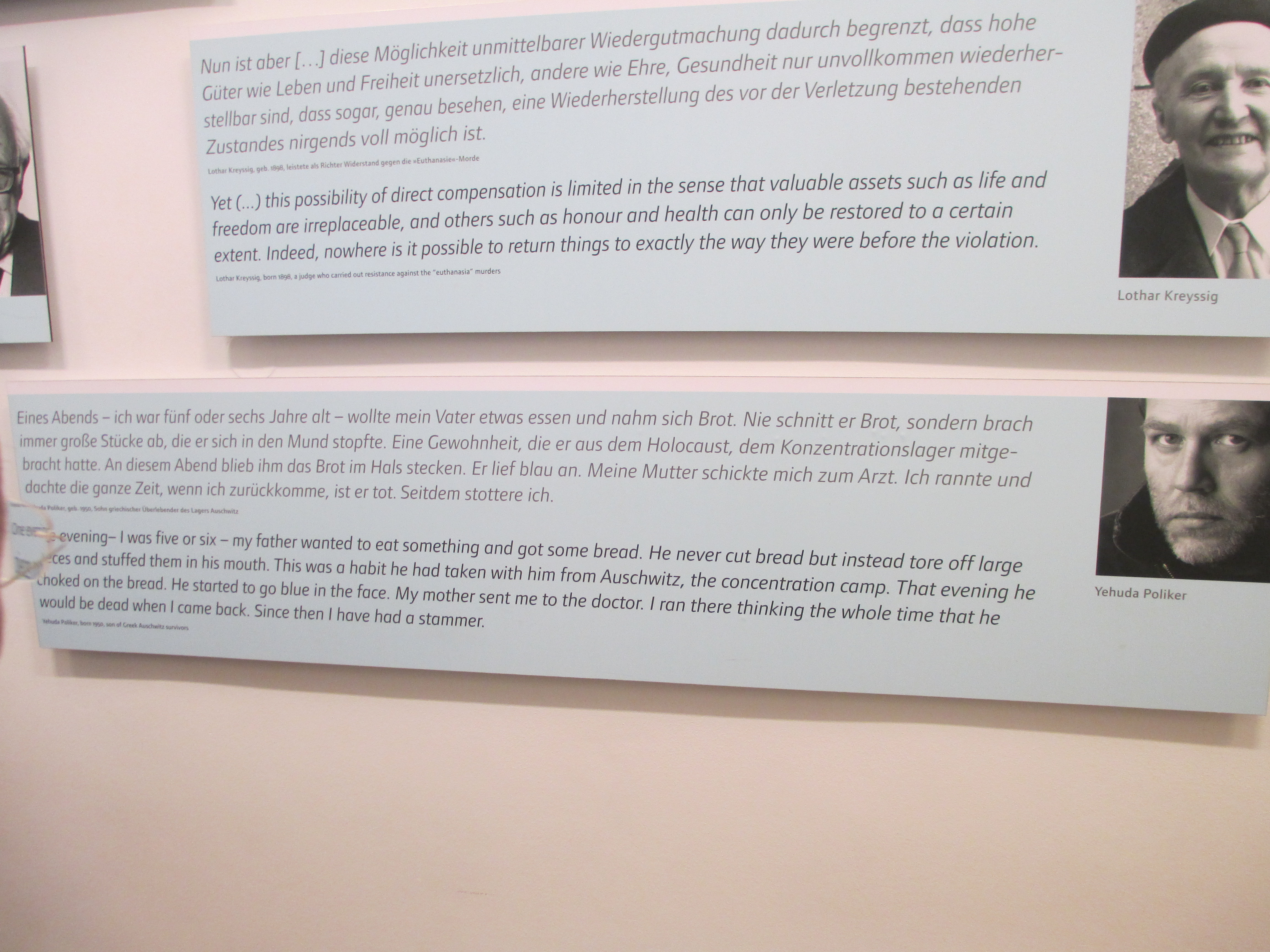 ציטוט של יהודה פוליקר בווילה ואנזה